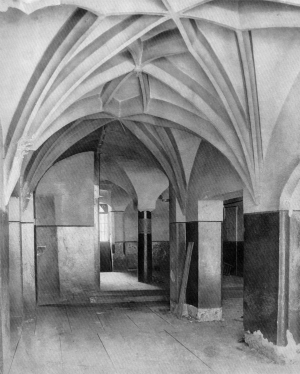 Gotisches Kreuzgewölbe im Orthschen Haus in Heilbronn. Gebäude wurde 1901 abgerissen.